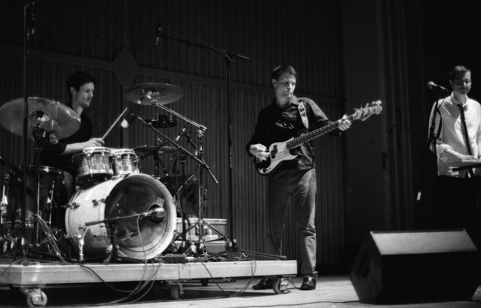 Prater der Volksbühne / Berlin / September 17th 2009